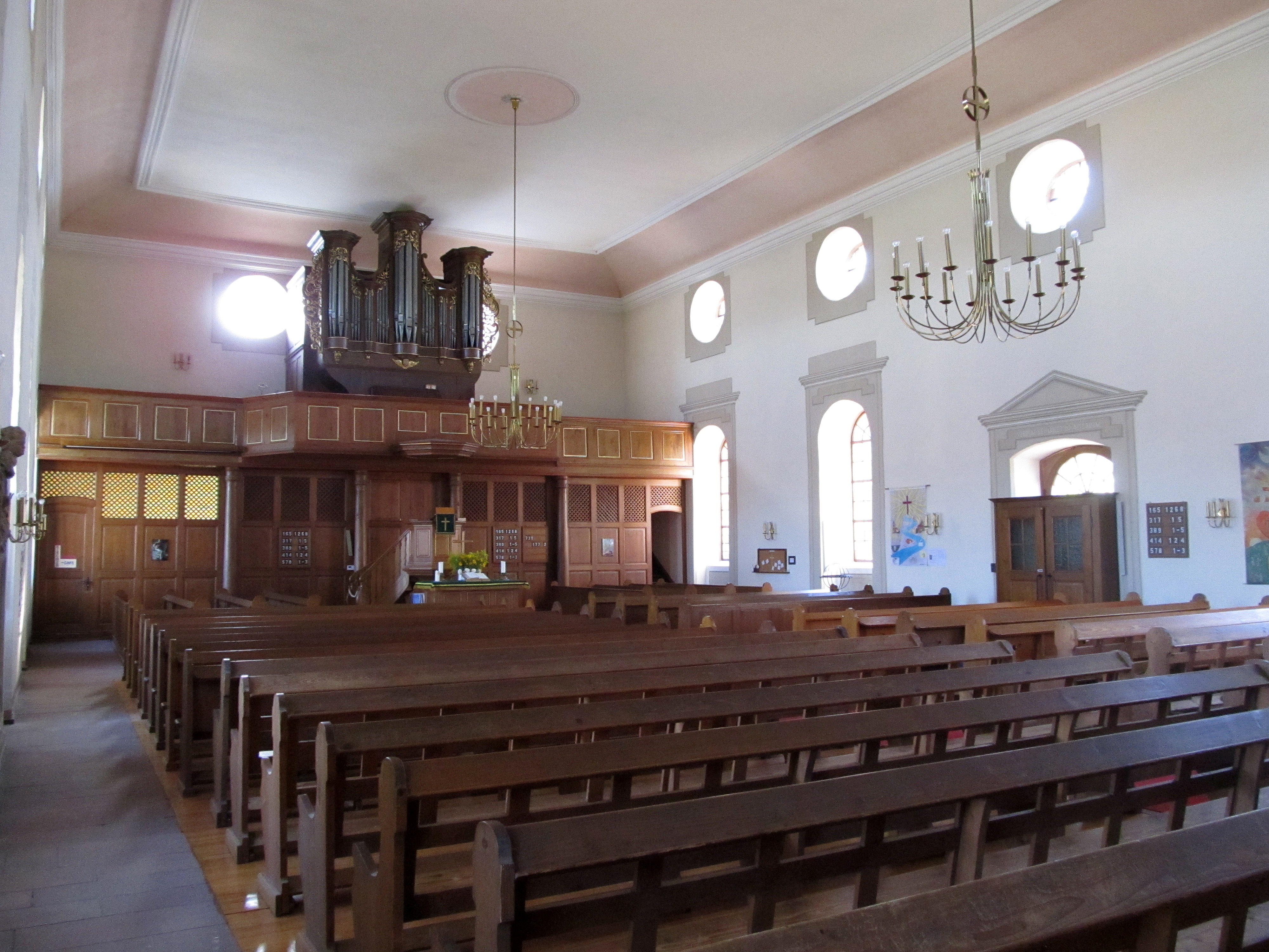 Blick ins Innere der protestantischen Klosterkirche in Hornbach, Rheinland-Pfalz